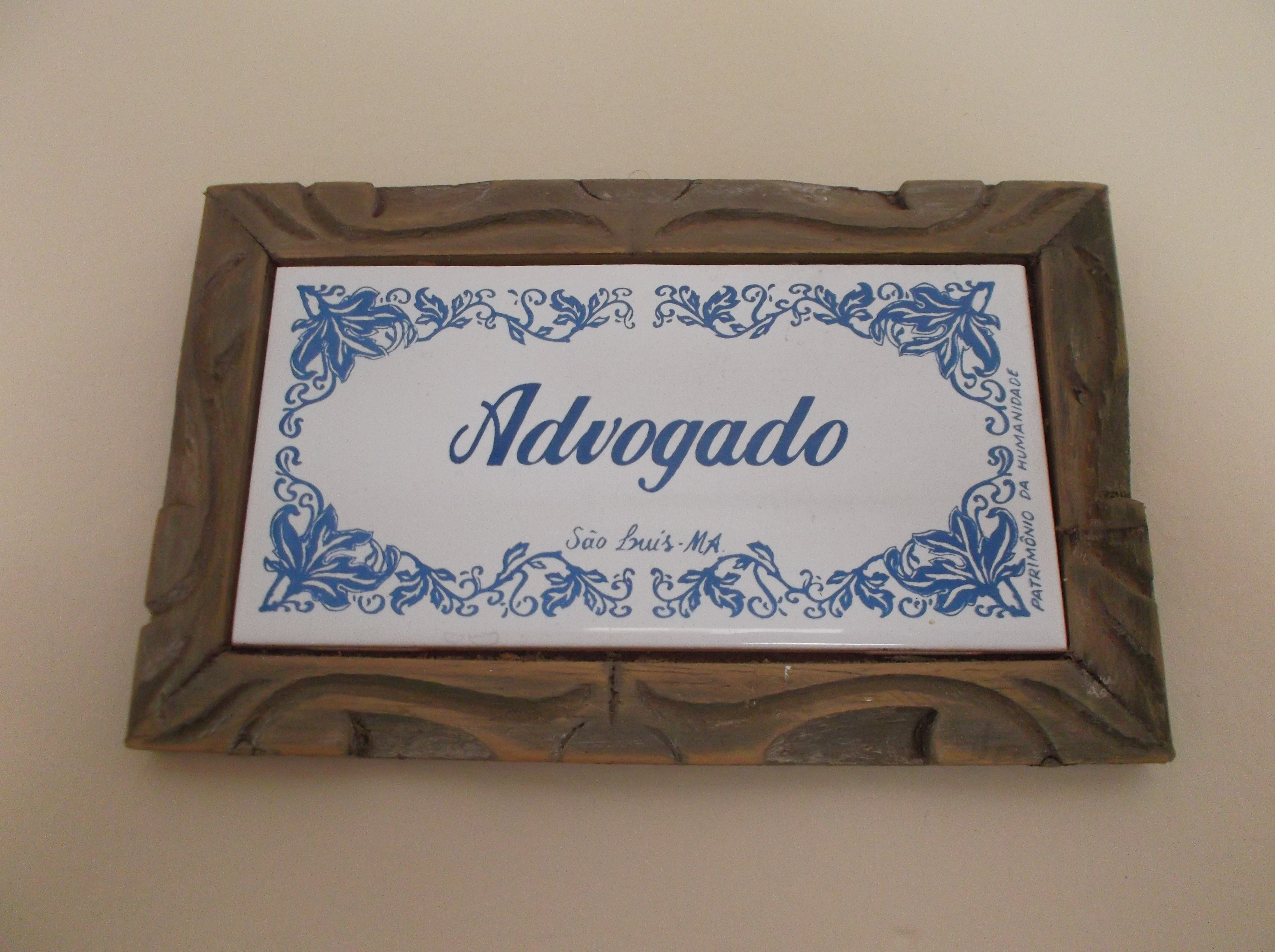 Exemplar de Azulezo de São Luis do Maranhão.